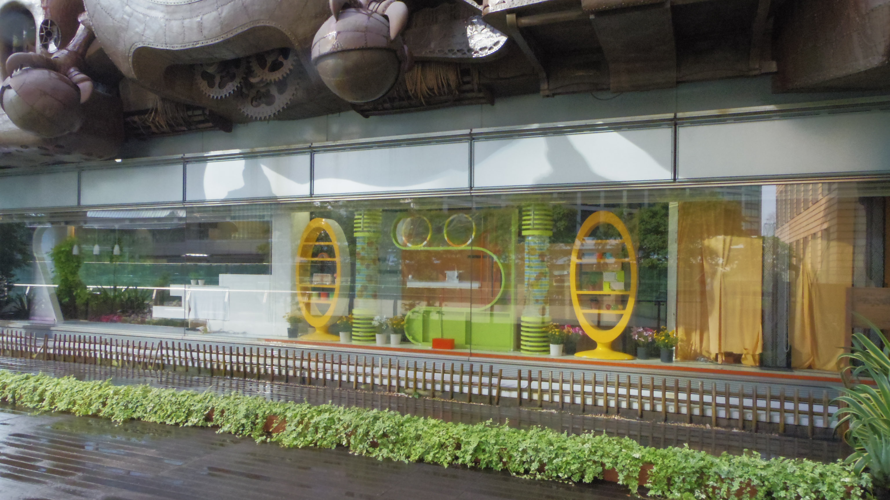 日本テレビ「マイスタジオ」（2015年9月撮影）。